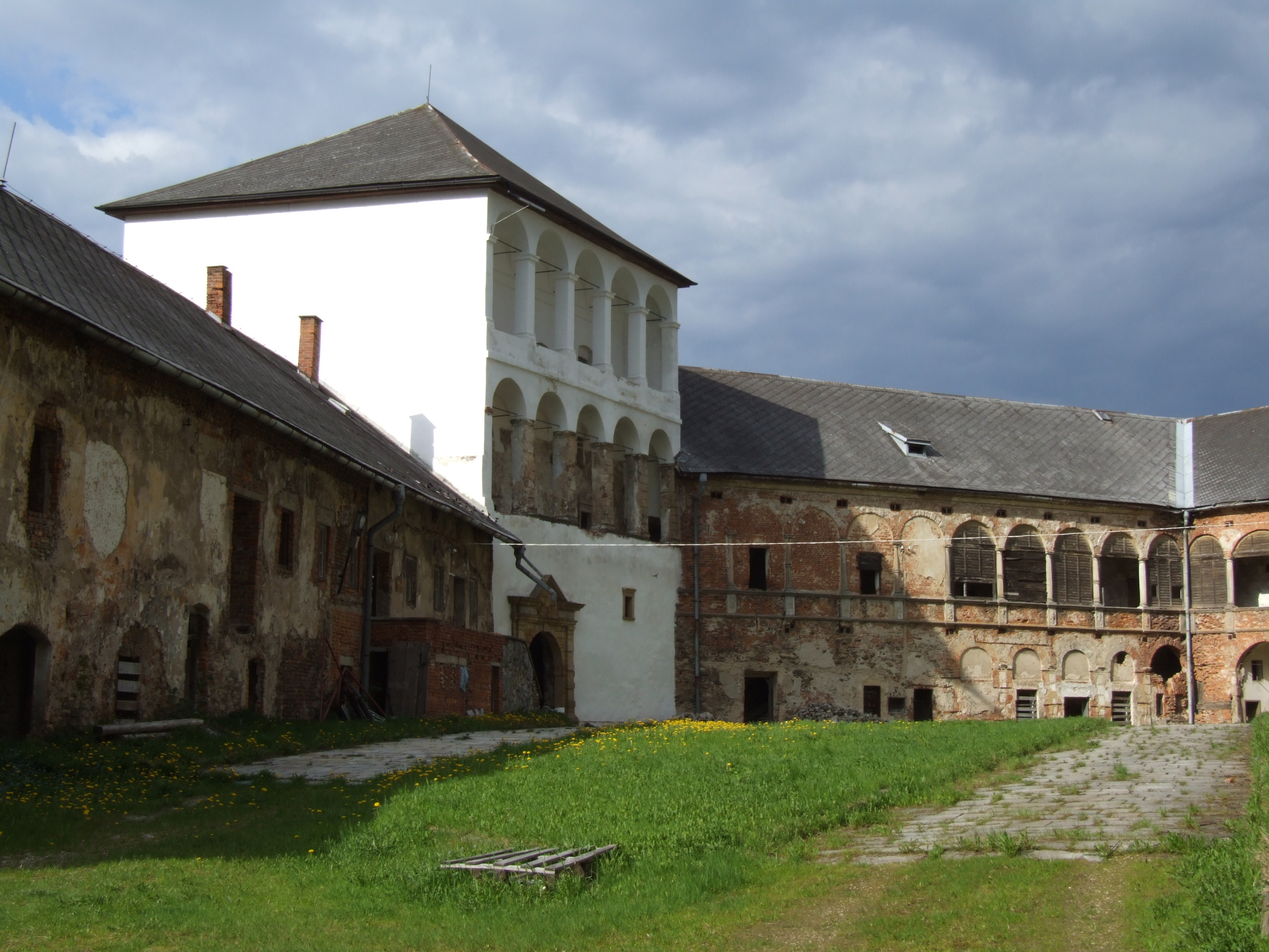 Branna (Goldenstein) - hrad Kolštejn